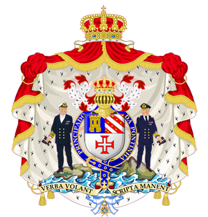 Brasão do Principado da Pontinha